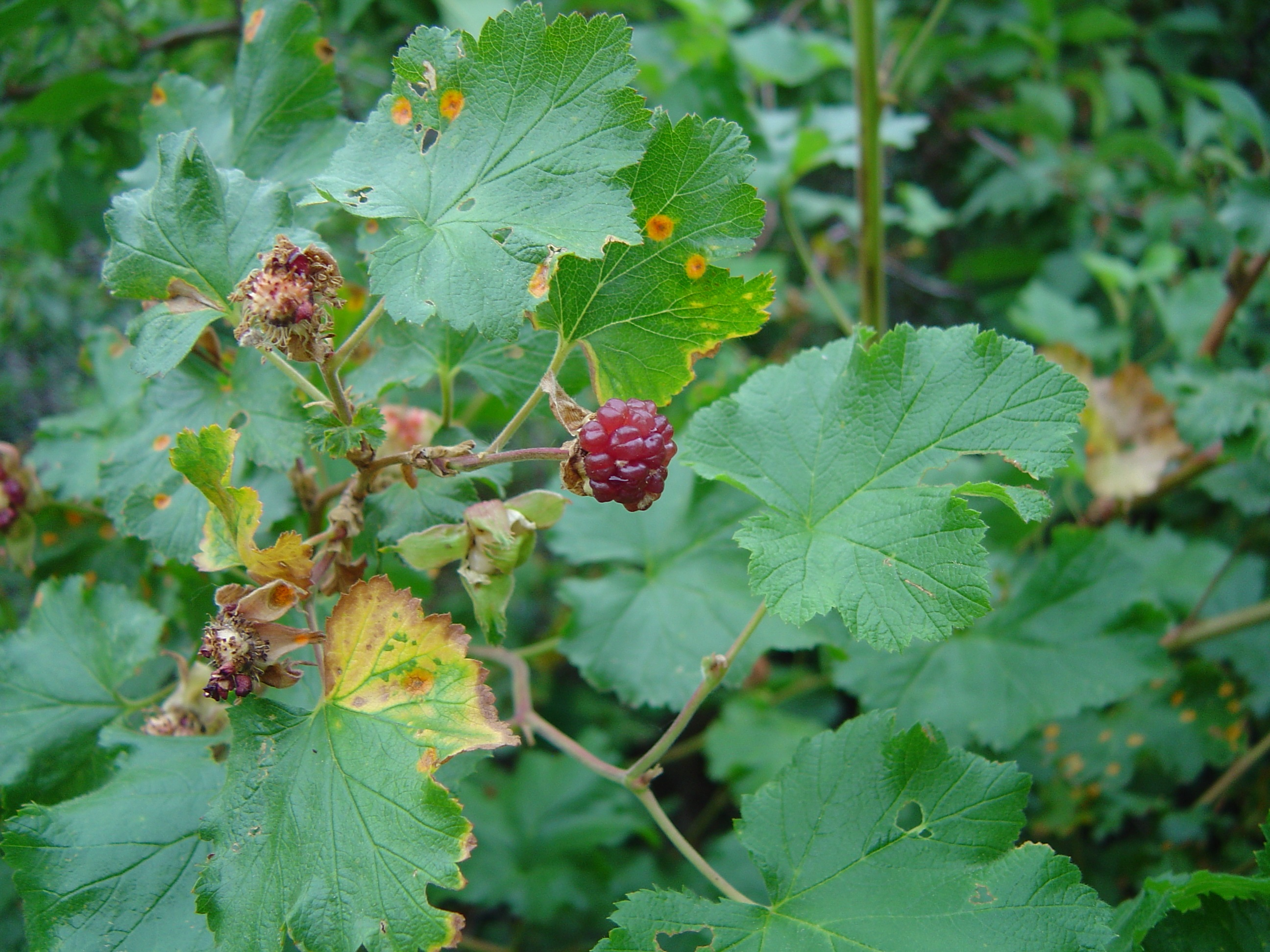 taken Boulder, Colorado